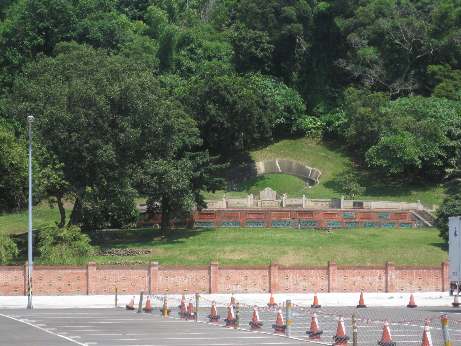 辜顯榮之母薛麵的墳墓，位在臺灣彰化的八卦山山腳下。